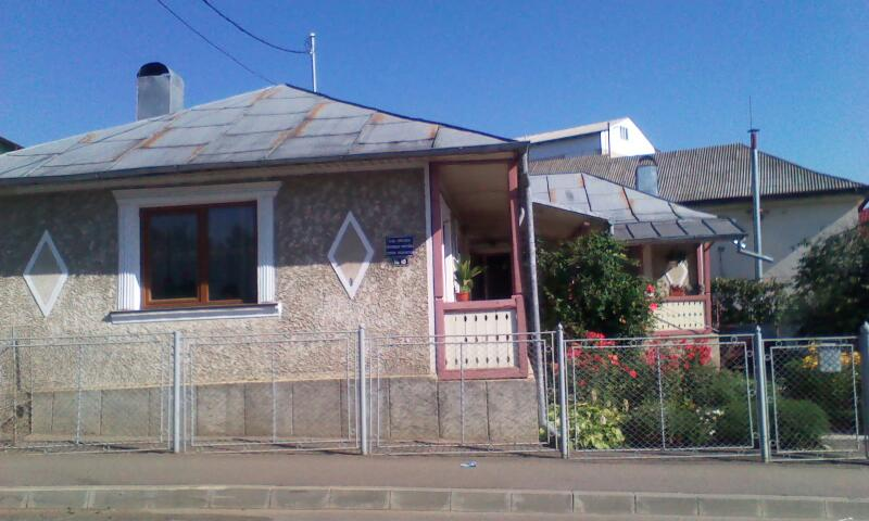 Aceasta este CASA COPILARIEI PICTORULUI PROFESOR STEFAN SOLDANESCU, aflata in mun. Falticeni, jud. Suceava, Str. Ion Creanga, nr. 10